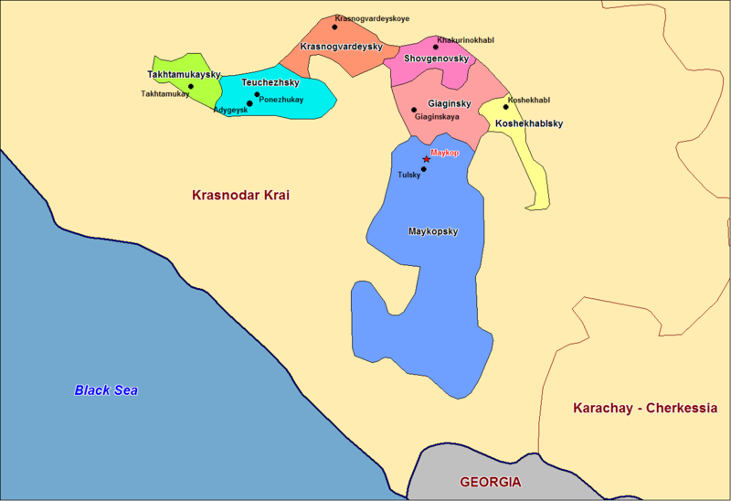 Adygea_discrits